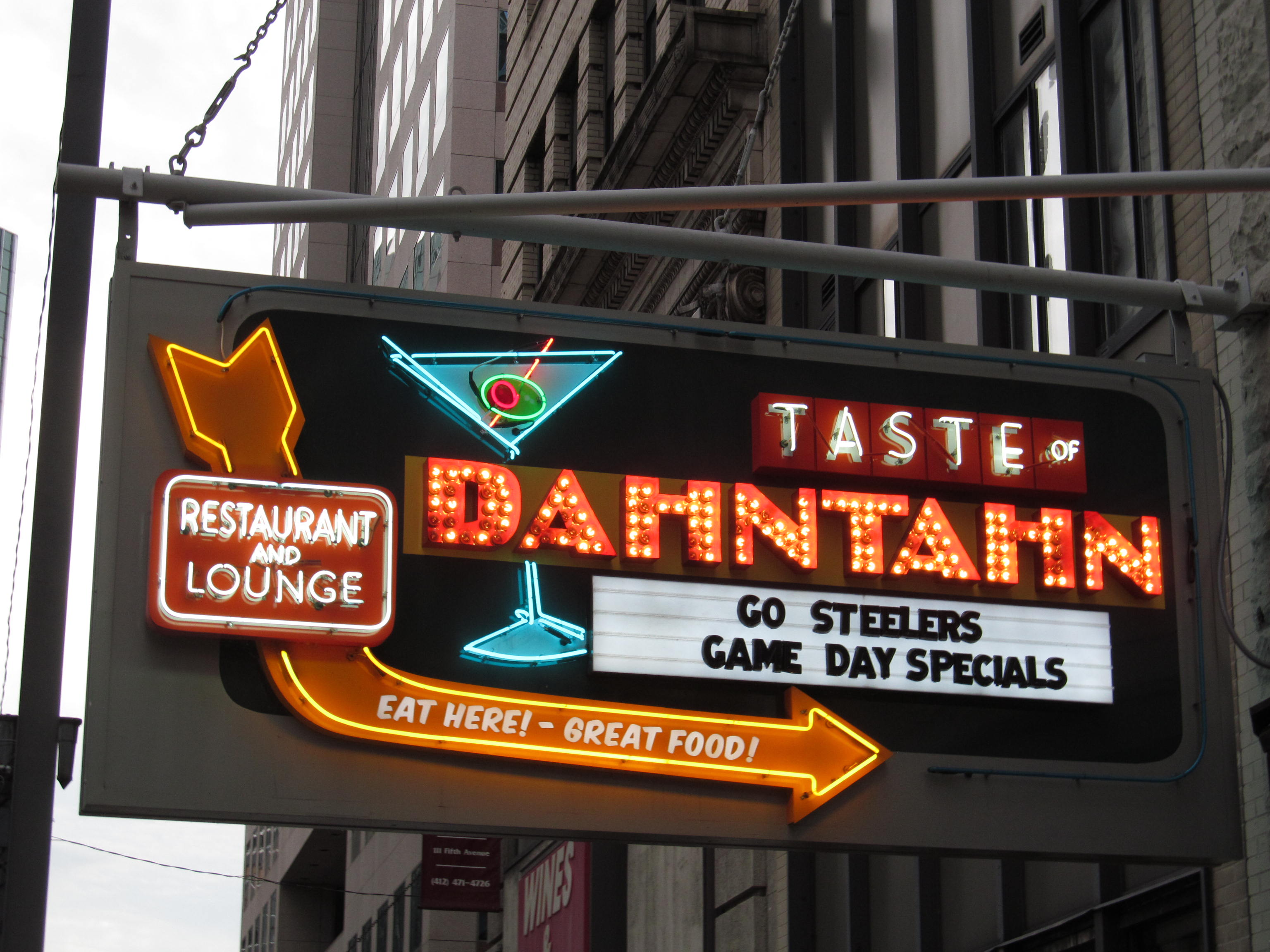 Pittsburgh, Pennsylvania